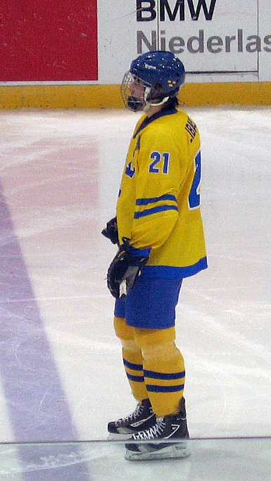 IIHF U18 WC 2011, Group B, Sweden vs. Canada 4:2, EnergieVerbund Arena, Dresden